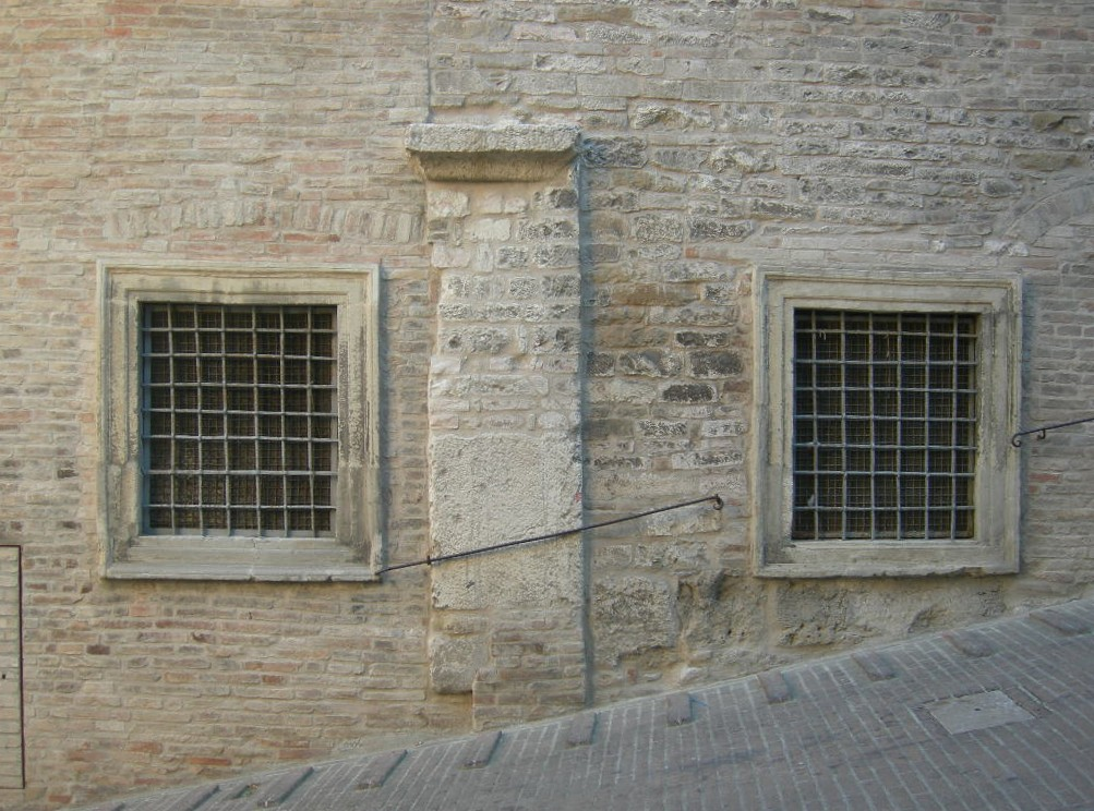 Resti dell'antica porta urbica medievale meridionale, in contrada San Polo (attuale via A.Saffi) in Urbino.